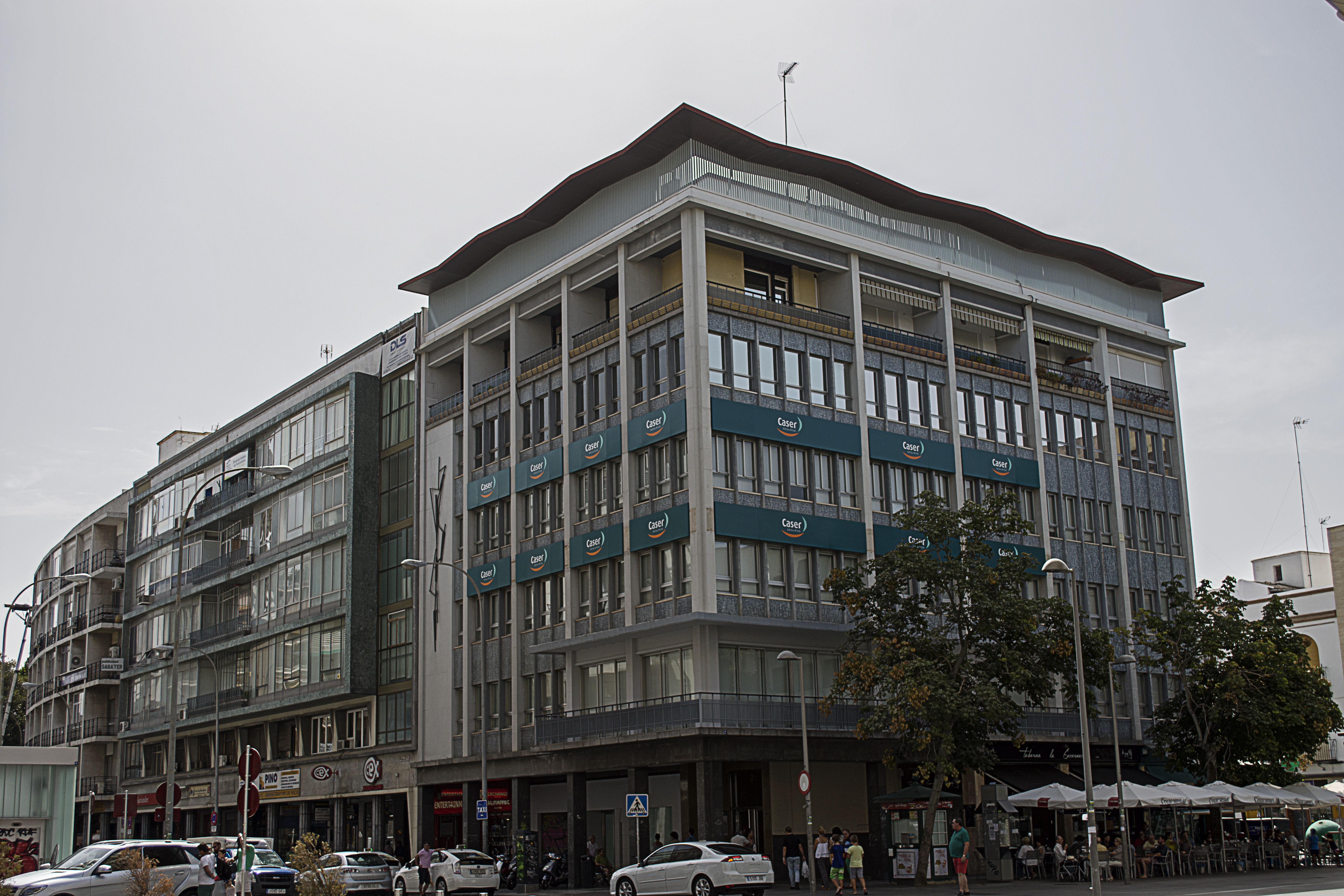 Antiguo edificio Caja San Fernando, calle imagen 2. Sevilla. Arquitectos Arévalo Carrasco, Rafael y Costa Vals, Ignacio. 1957-1961)